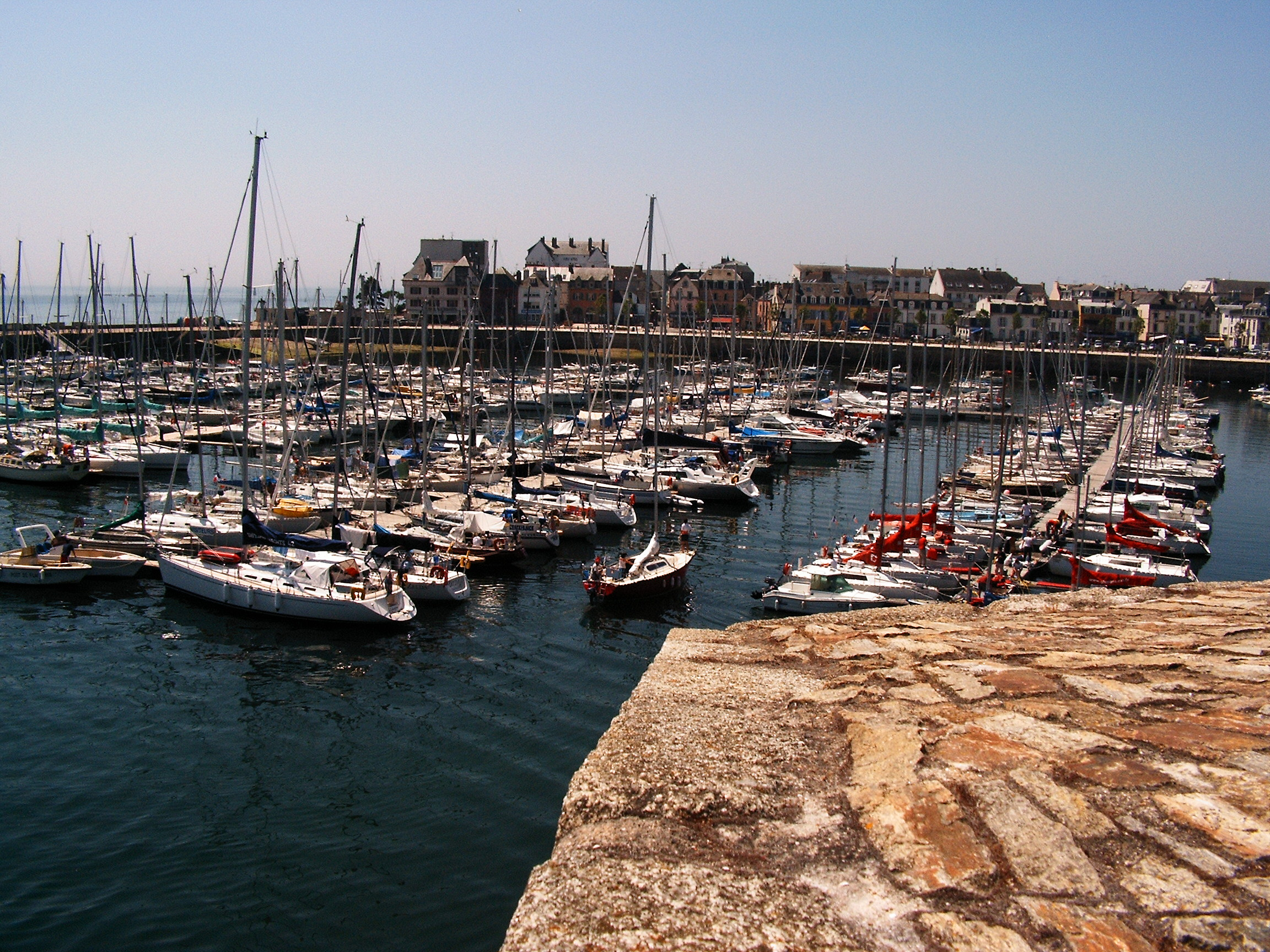 Concarneau in der Bretagne - Yachthafen